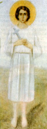 Фреска в Жировичском монастыре (Белоруссия) с изображением мученика-младенца Гавриила Белостокского.